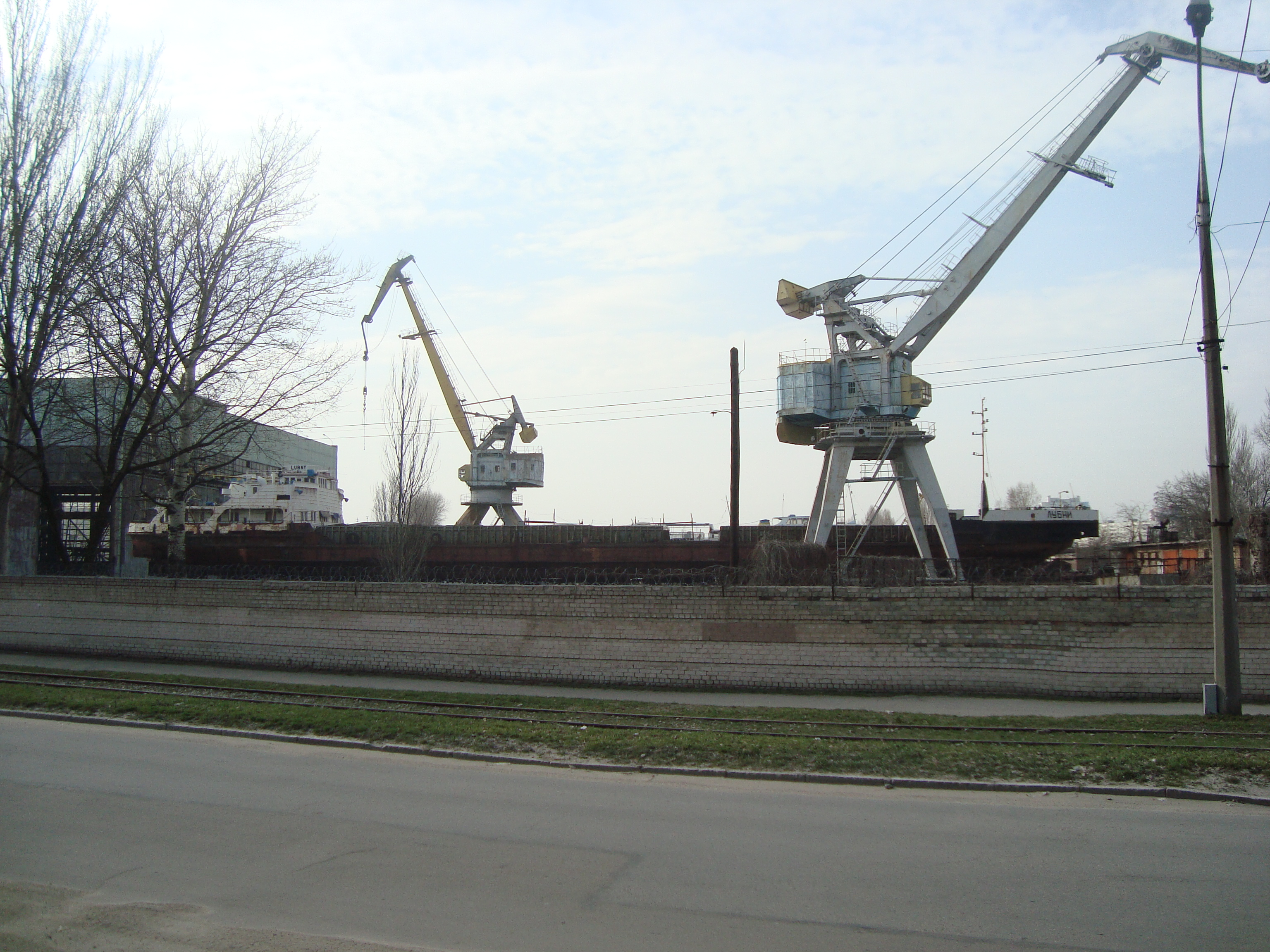 Слип с сухогрузом «Лубны» на «Запорожском судостроительно-судоремонтном заводе»